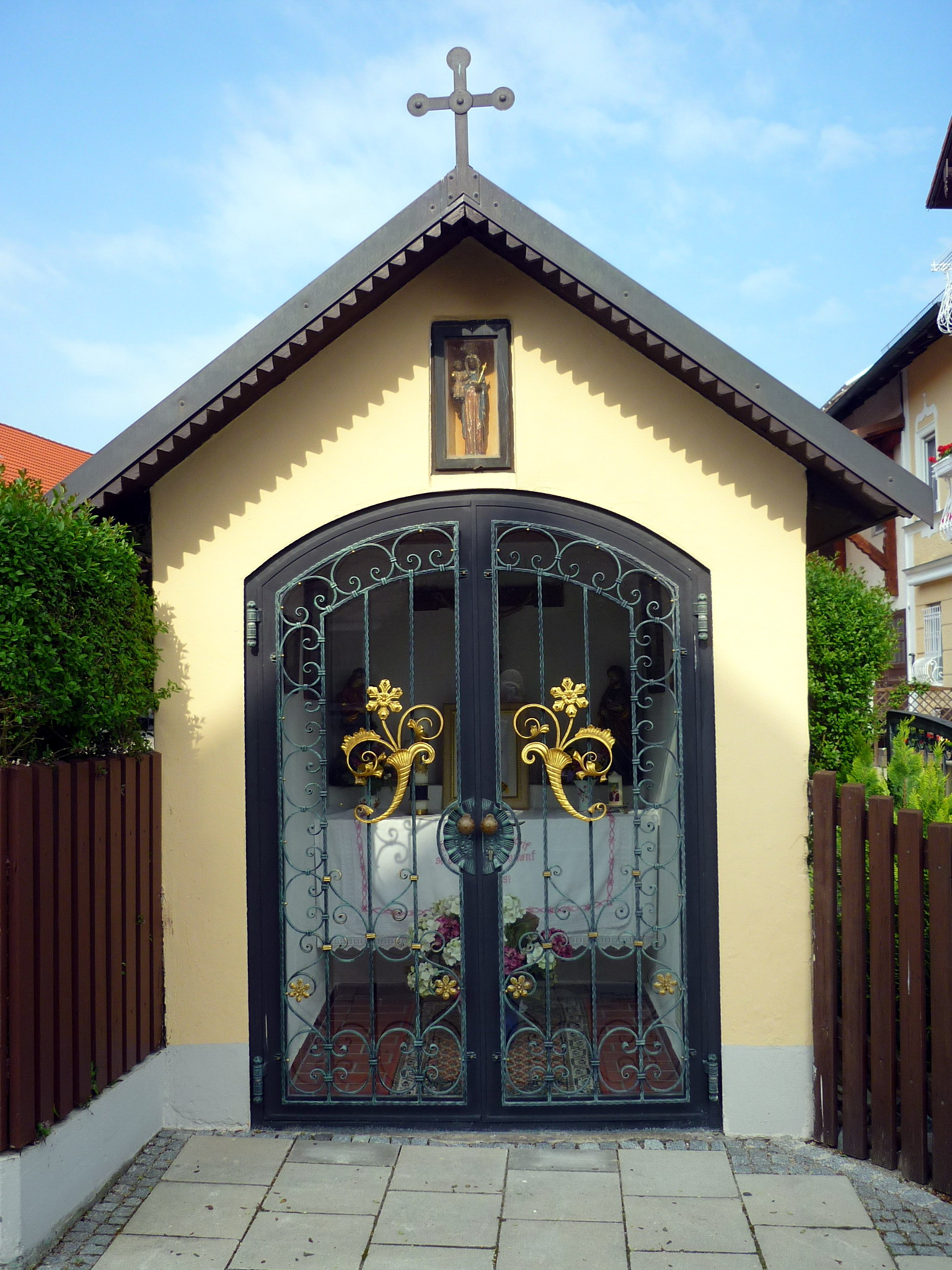 Ismaning, Kapelle des Zacherlhofes, Dorfstrasse 2